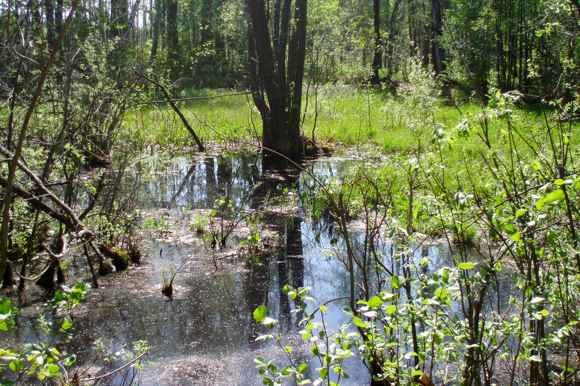 Болото недалеко от д. Полесково, Муромский район Владимирской области